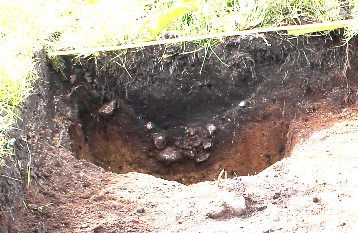 Profil stakketuft